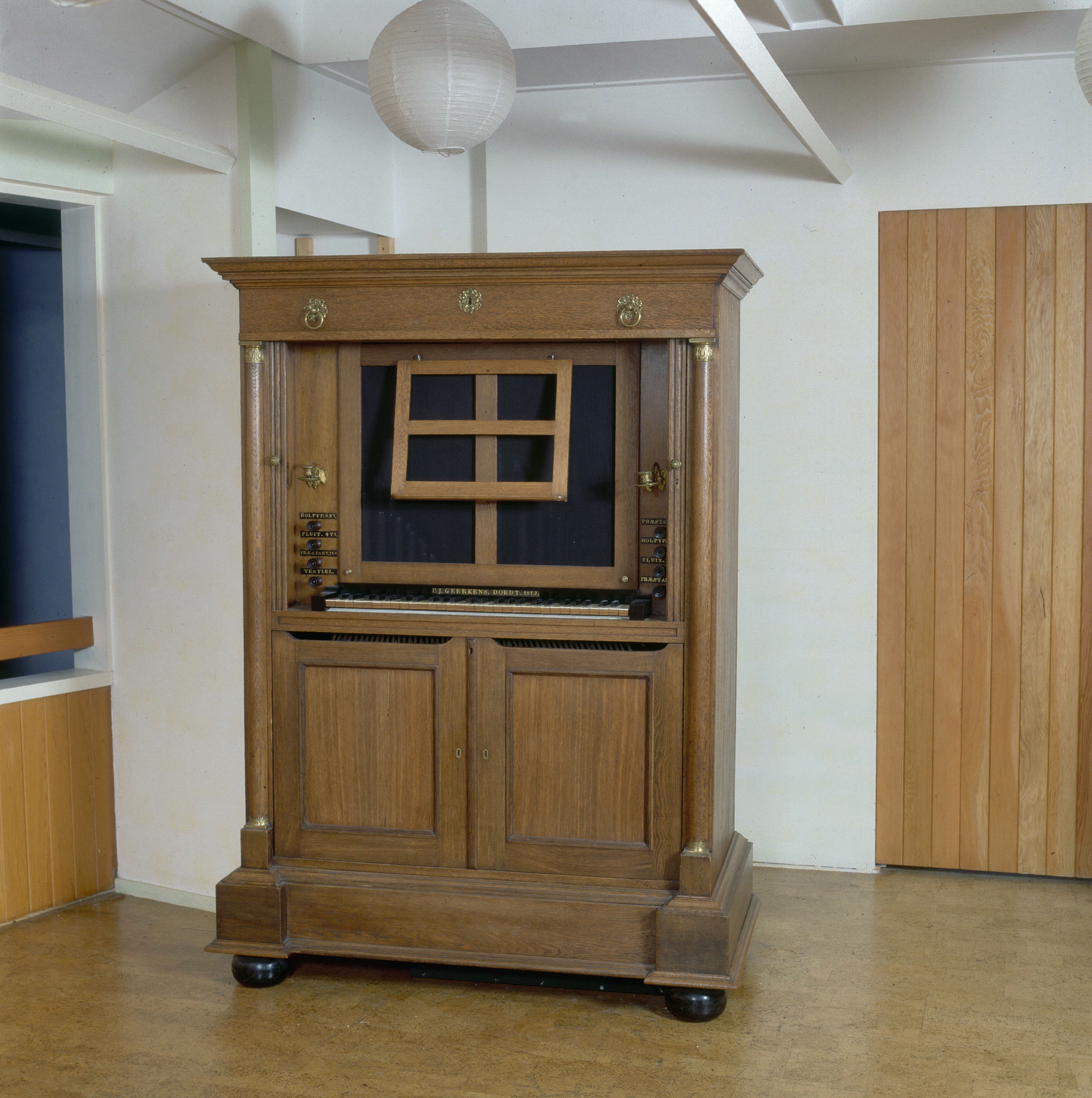 Hervormde kerk, thans Christengemeenschap: Interieur, aanzicht secretaire-orgel (opmerking: Gefotografeerd voor Het Historische Orgel in Nederland 1819-1840, bladzijde 47)